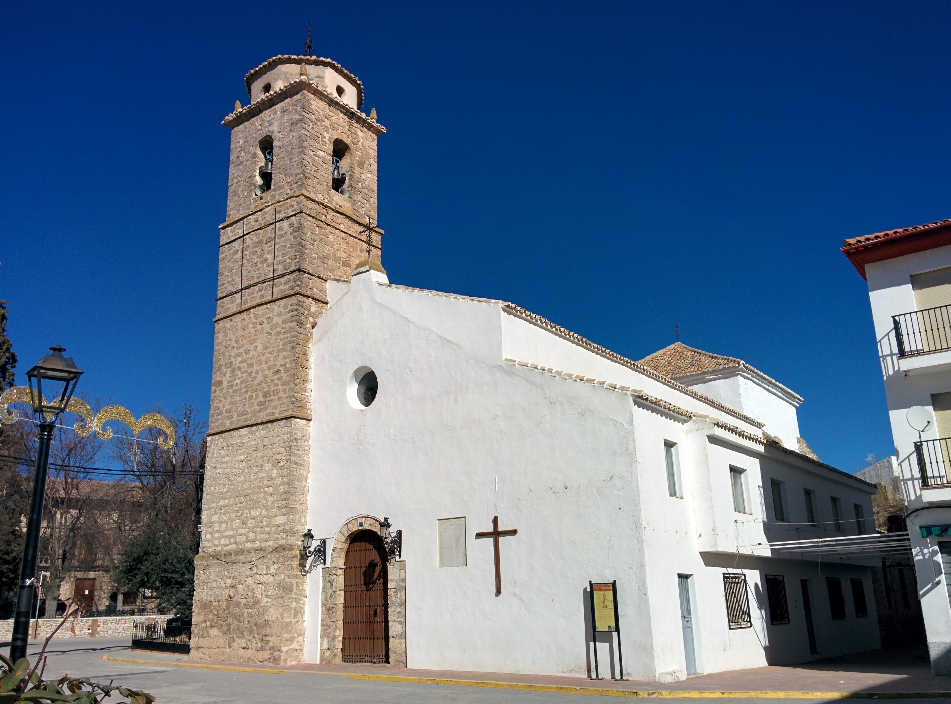 Iglesia de la Asunción, en Noalejo (Jaén, España).